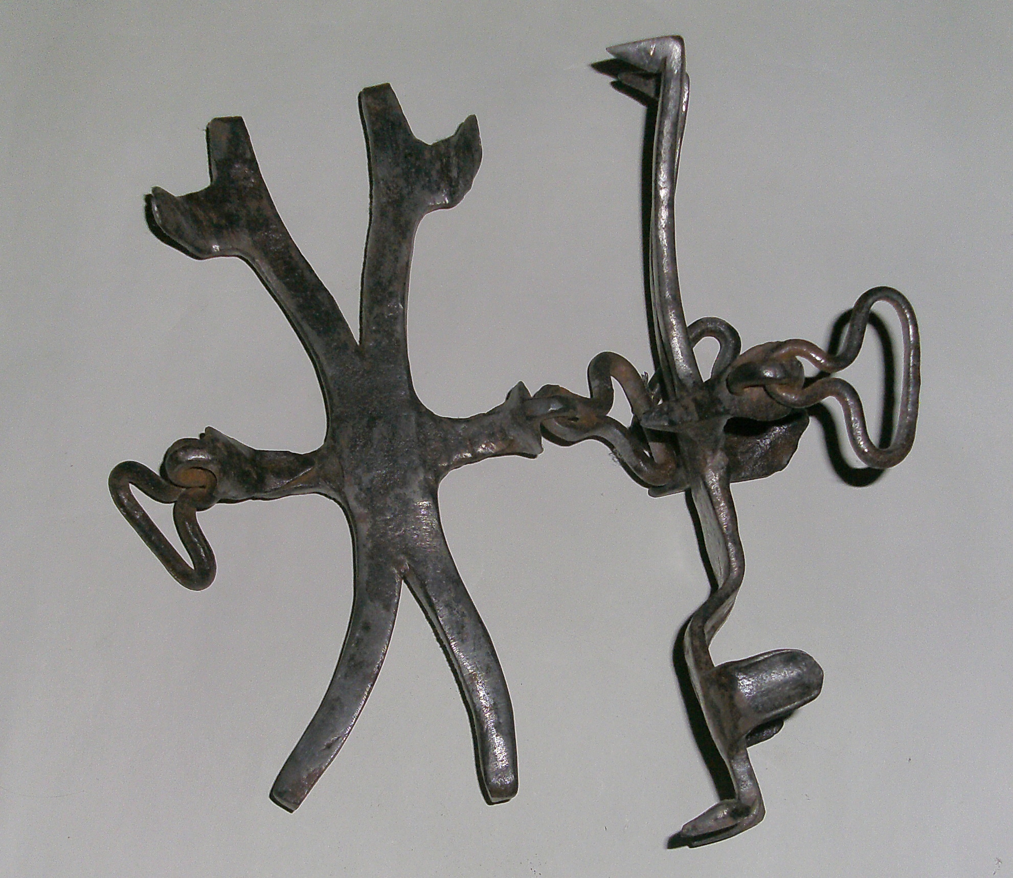 historisches Steigeisen für Wiesmahd und Flößer